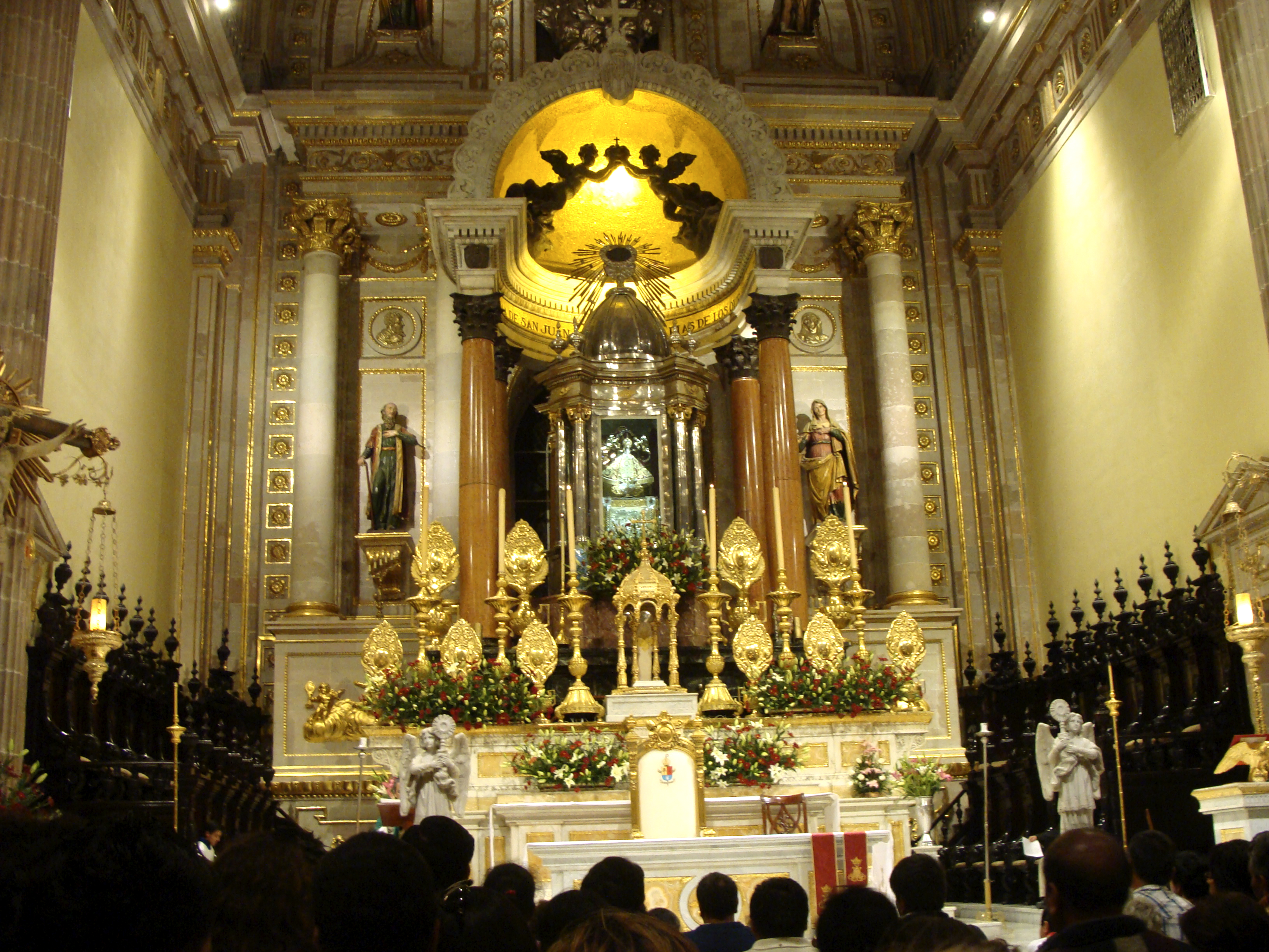 Catedral de la Virgen de San Juan de los Lagos